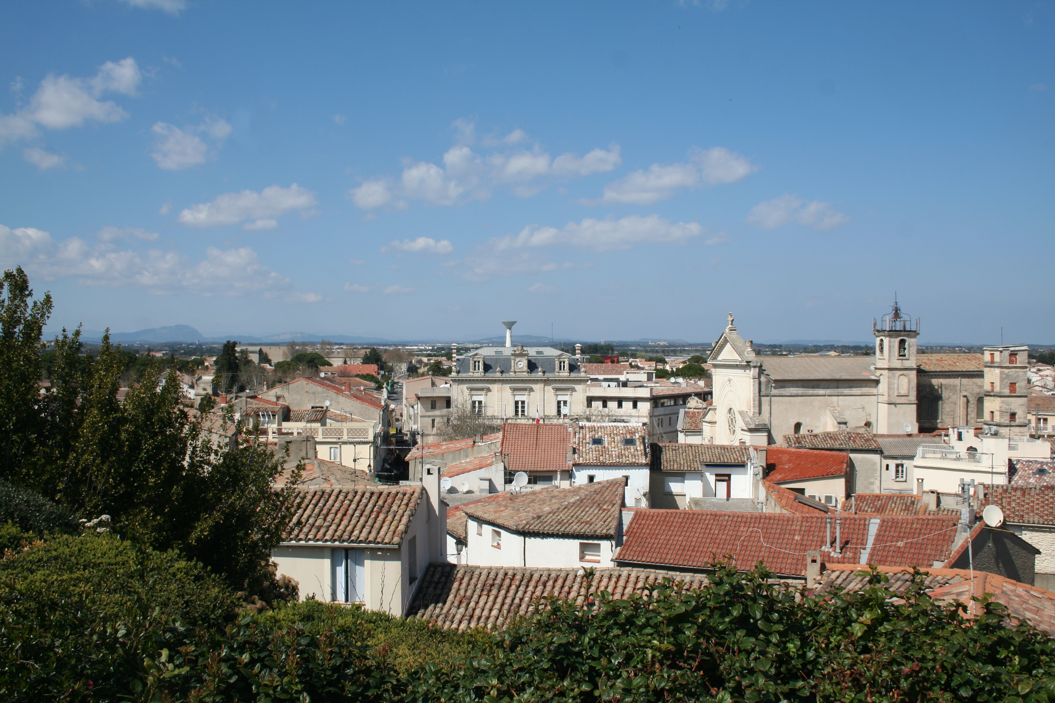 Mauguio (Hérault) - vue générale vers le nord, depuis la motte. À l'horizon, le pic Saint-Loup